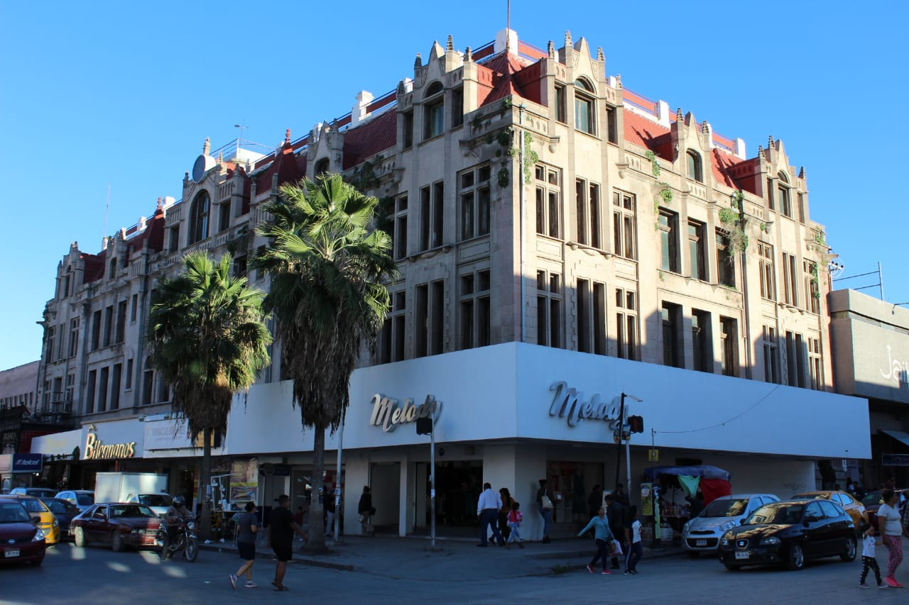 Antiguo hotel el Salvador en el centro histórico de la ciudad de Torreón